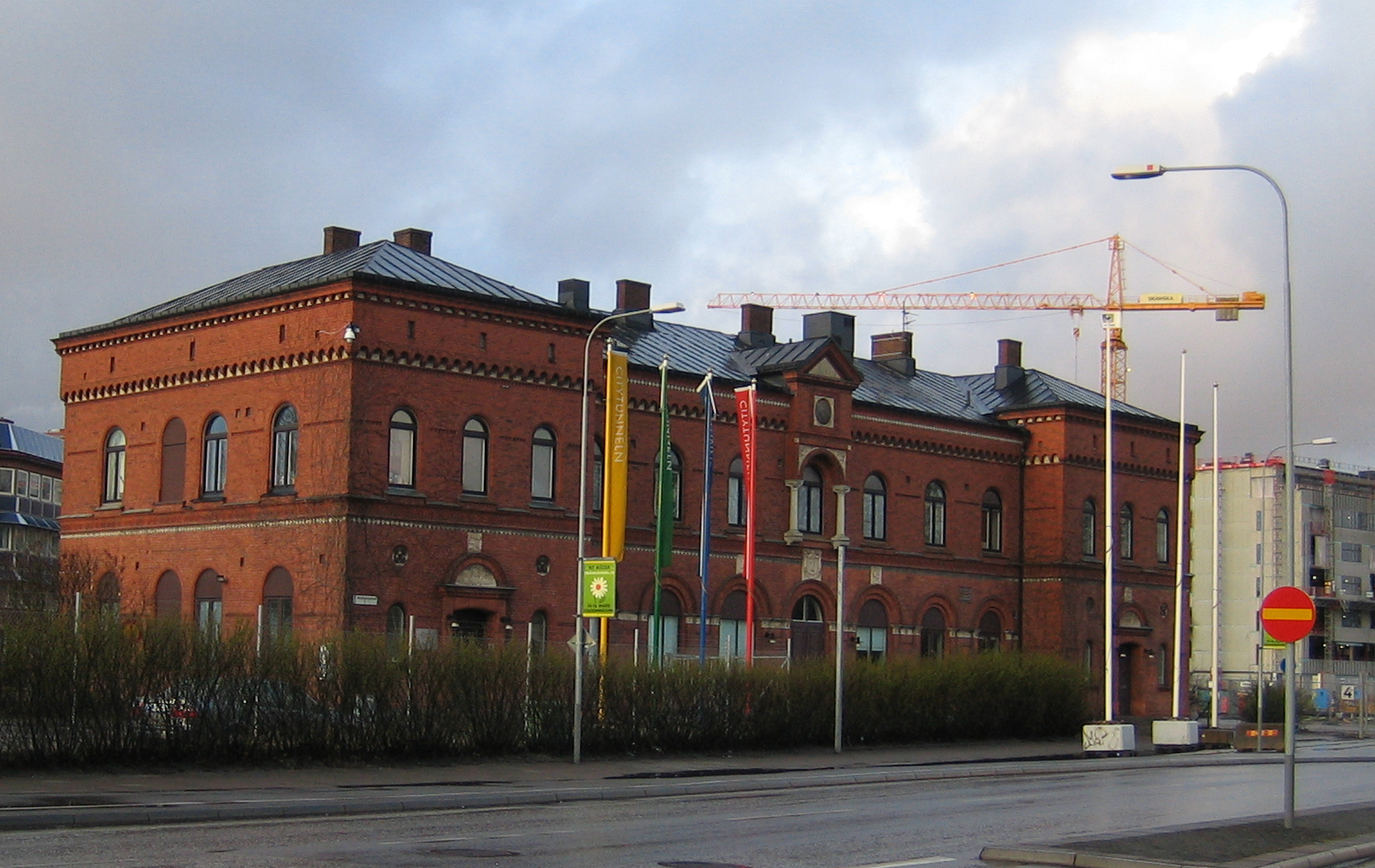 Former railway station Malmö Västra